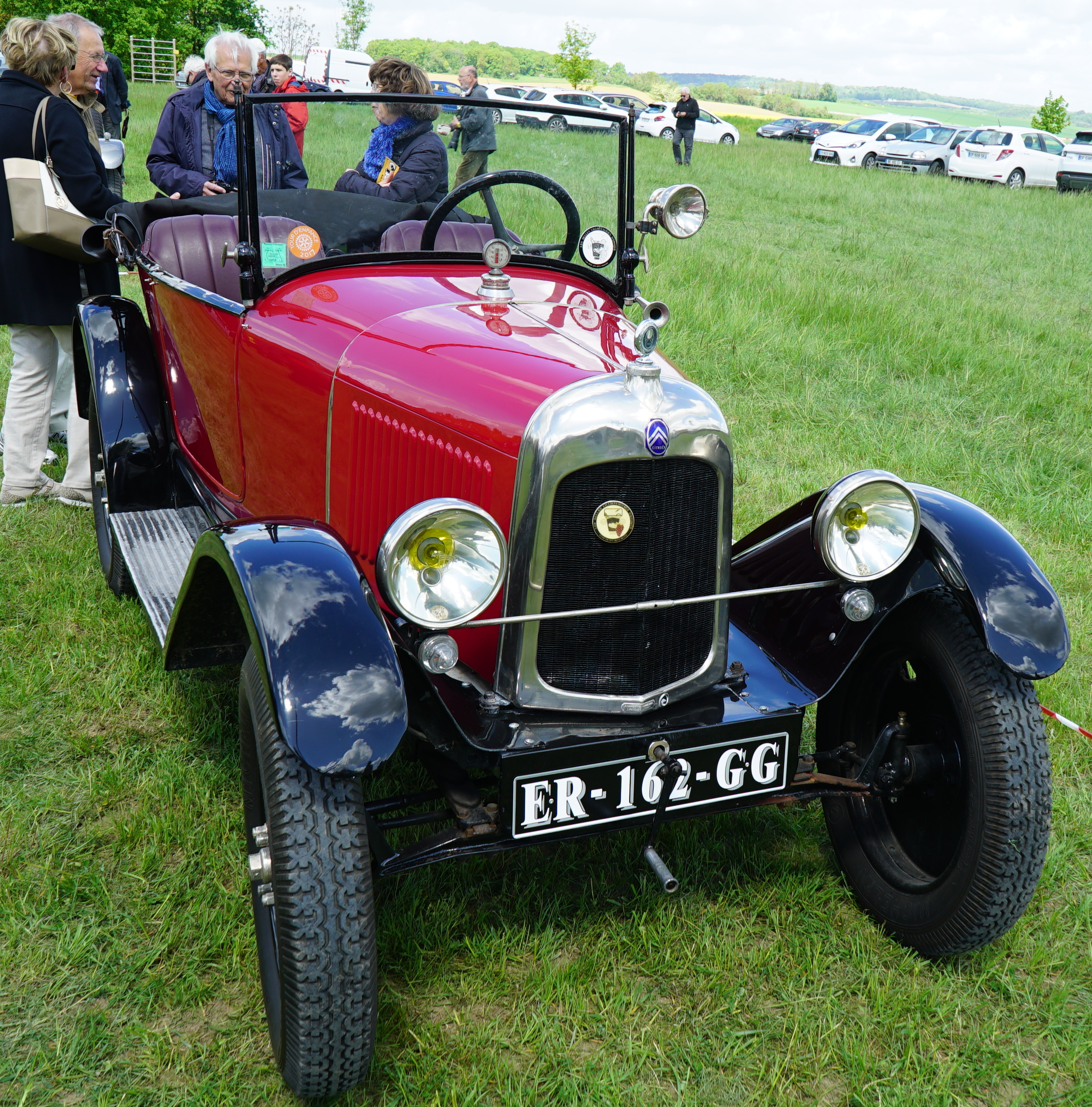 lors de la Course Paris-Amsterdam, 2018 sur le circuit de Gueux.